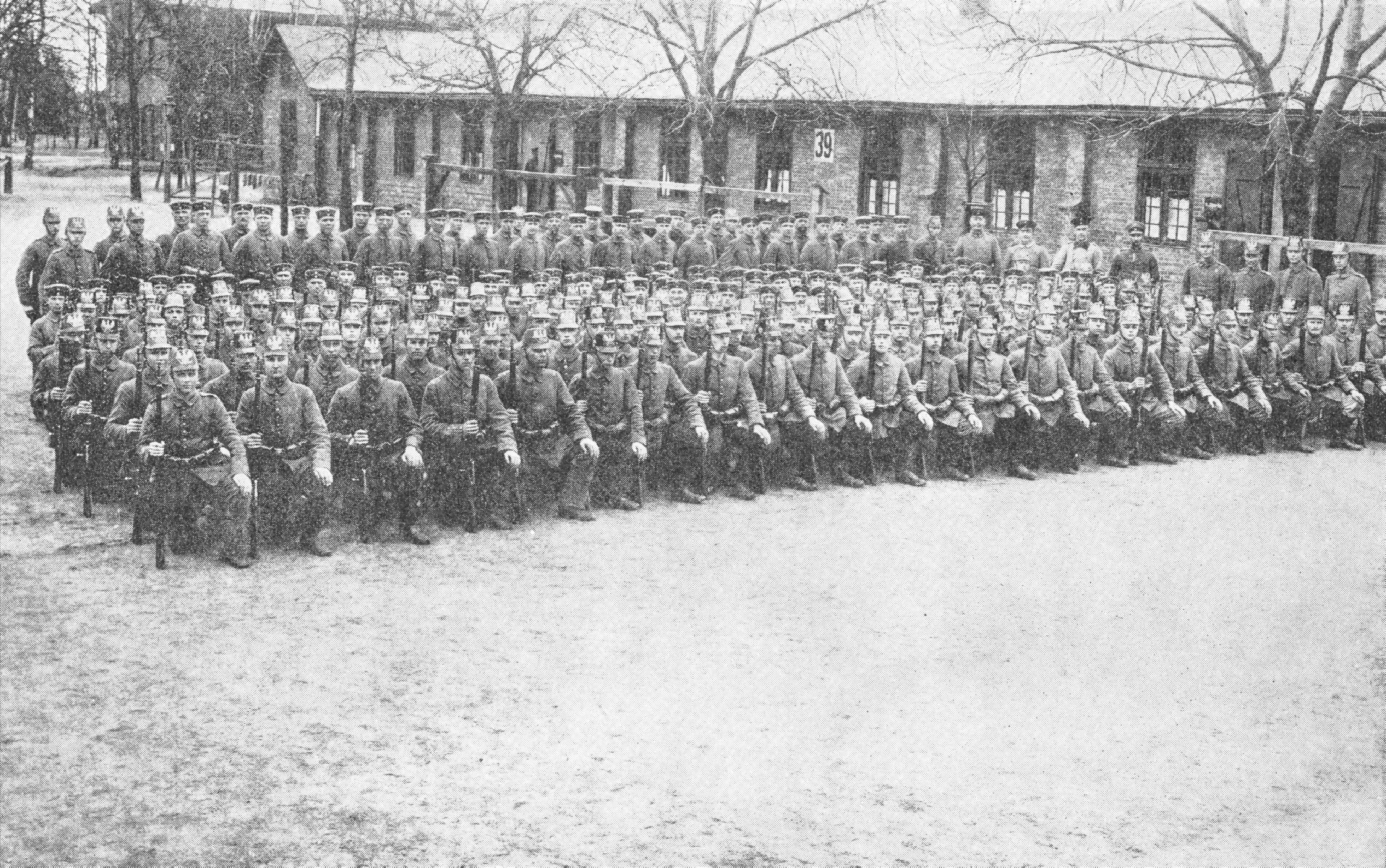 Description